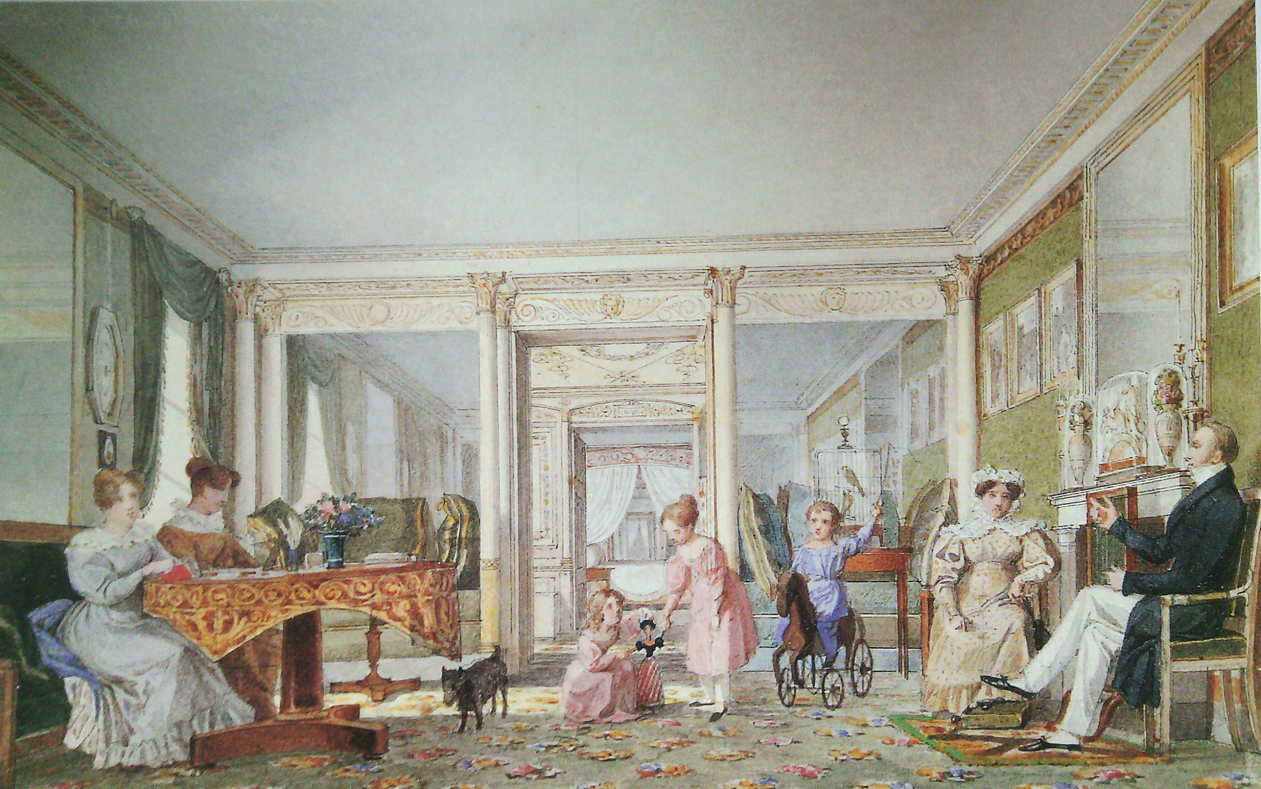 Семья Гагариных: изображен князь Николай Сергеевич Гагарин (1784-1842), рядом с тещей графиней А. В. Бобринской, слева за столом его жена - княгиня Мария Алексеевна Гагарина (1796-1835) с гувернанткой. В центре, на ковре играющие их дети - Мария, Леонилла и Николай.